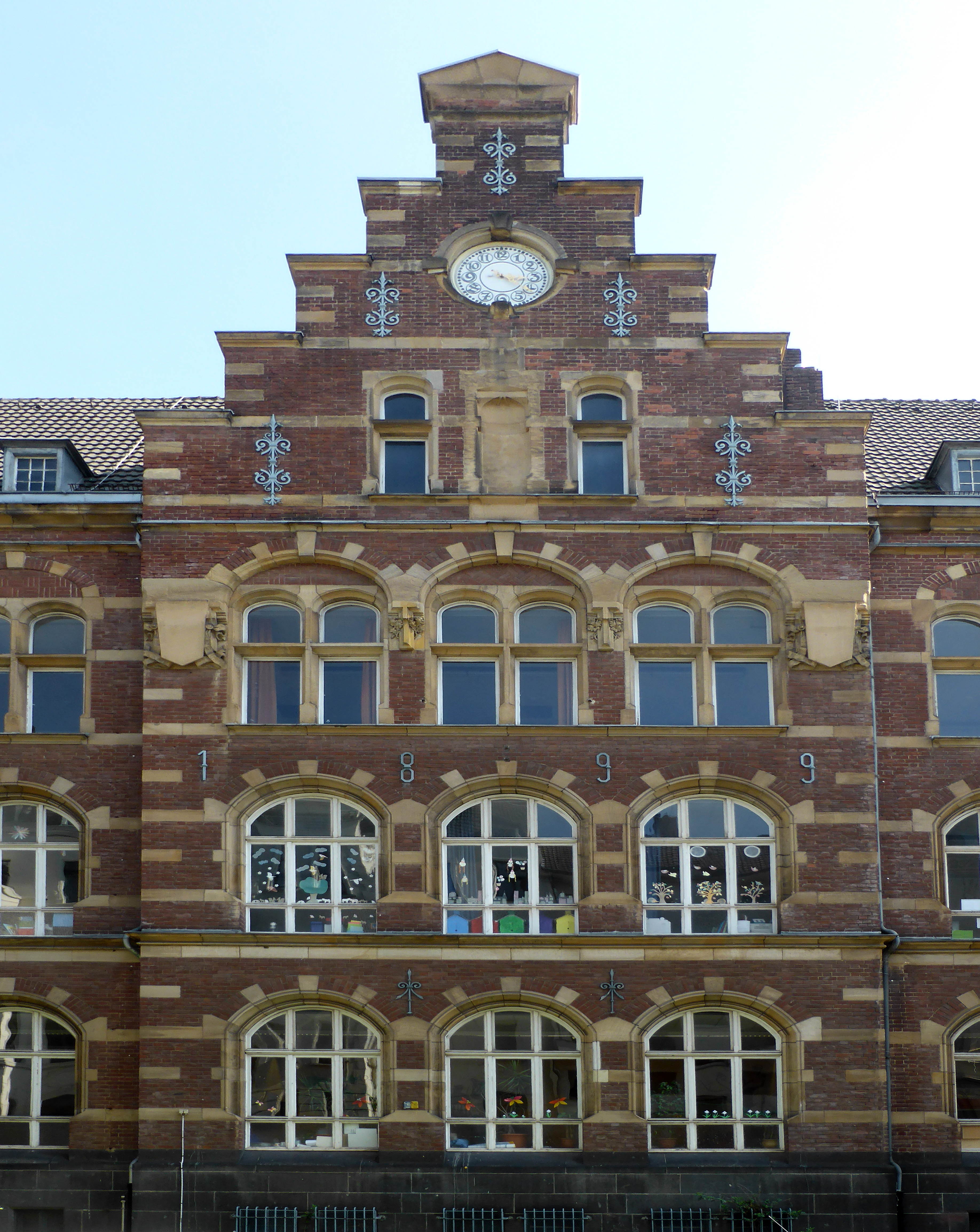 Stephan-Lochner-Schule, Köln (Lochnerstraße 13-15). This is a photograph of an architectural monument.